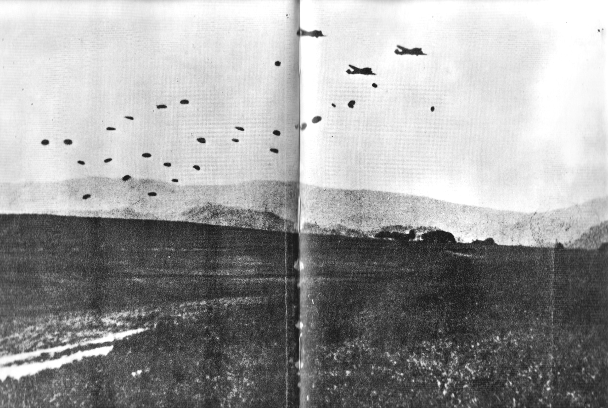 Srpskohrvatski / српскохрватски: Desant nemačkih padobranaca na Vrhovni štab NOVJ u Drvaru 1944.